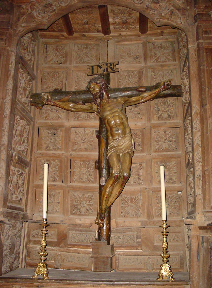 Parroquia de Santa María del Azogue en Valderas (León, España). En un hueco con forma de concha y a manera de altar, está colocado un cristo llamado de la Concha. La talla es renacentista y tiene la particularidad de presentar una forma curvada hacia su izquierda, saliéndose la figura del palo de la cruz. Es del siglo XVI, escuela de Berruguete. Autor de la imagen: Lourdes Cardenal, enero 2006.